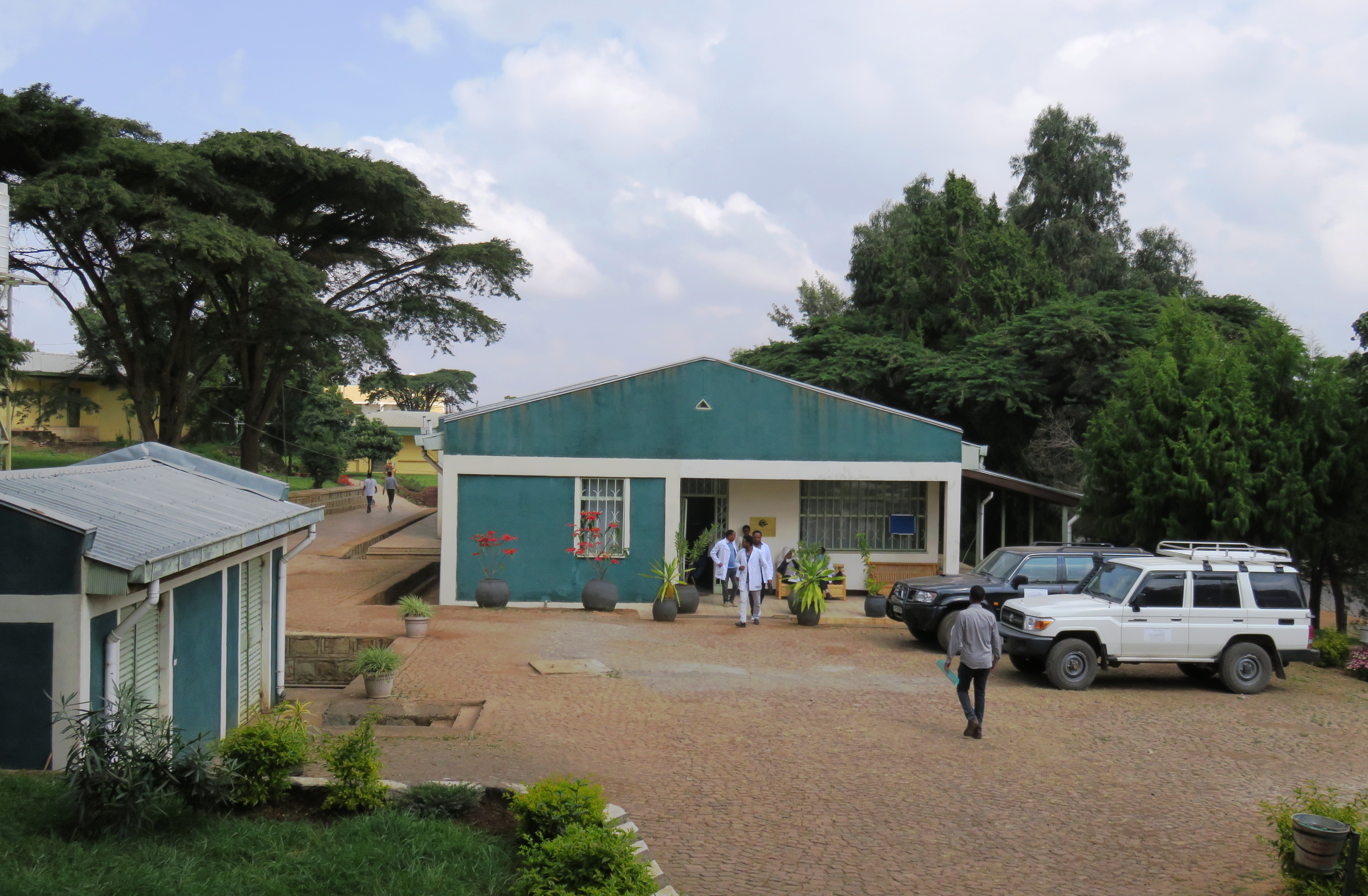 Ansicht des Instituts mit Vorplatz